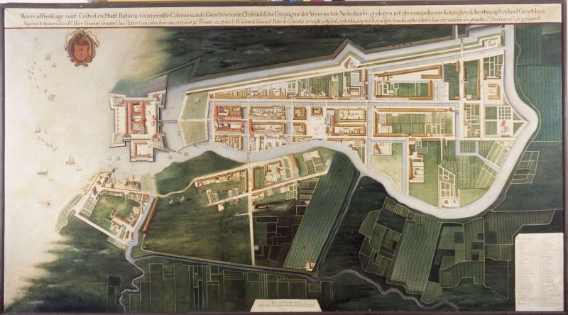 Reproductie. Olieverfschilderij van de plattegrond van Batavia uit circa 1627 in het Westfries Museum, 1919-1921. Dit is een oude afbeelding van de stad Batavia, zoals de situatie was in 1627. Geheel links is het vierkante kasteel van Batavia zichtbaar. Het was in die tijd het meest noordelijke bouwwerk van de stad. Binnen in het kasteel bevond zich overheidsgebouwen en de woning van de gouverneur. De oude loop van de rivier de Ciliwung is hier nog goed zichtbaar; de rivier kronkelt zich aan de westkant van de stad langs de nieuwe Hollandse bebouwing. Later is de rivier hier rechtgetrokken om als verdedigingsgracht dienst te doen. De vier beroemde hoekbastions met de namen van edelstenen, waren in deze tijd ook nog niet gebouwd. Binnen in de stad en vlak buiten de stad zijn de tuinen en aanplant te zien voor de verbouw van rijst en groenten.. Reproductie van een plattegrond van Batavia uit circa 1627